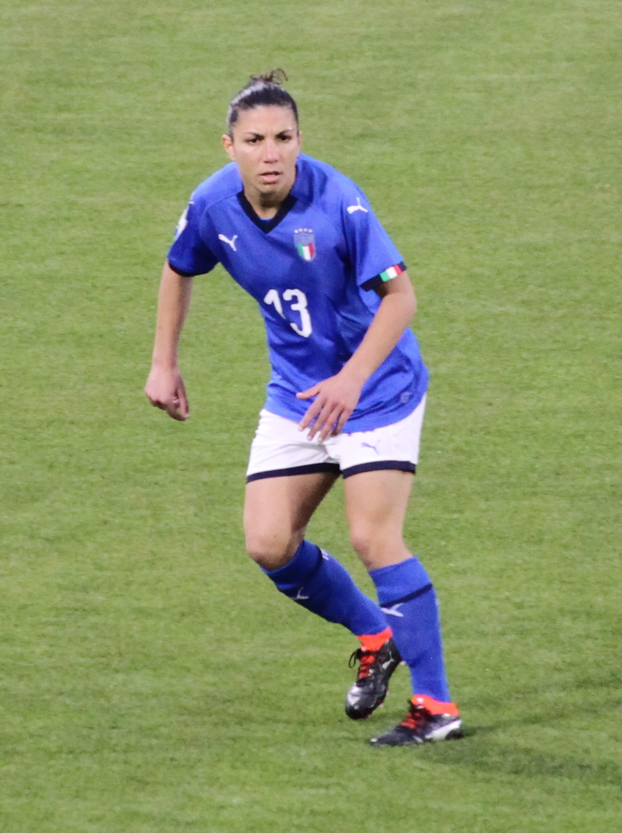 Elisa Bartoli, difensore della nazionale di calcio femminile dell'Italia, durante l'incontro Italia-Belgio del 10 aprile 2018 allo stadio Paolo Mazza di Ferrara.